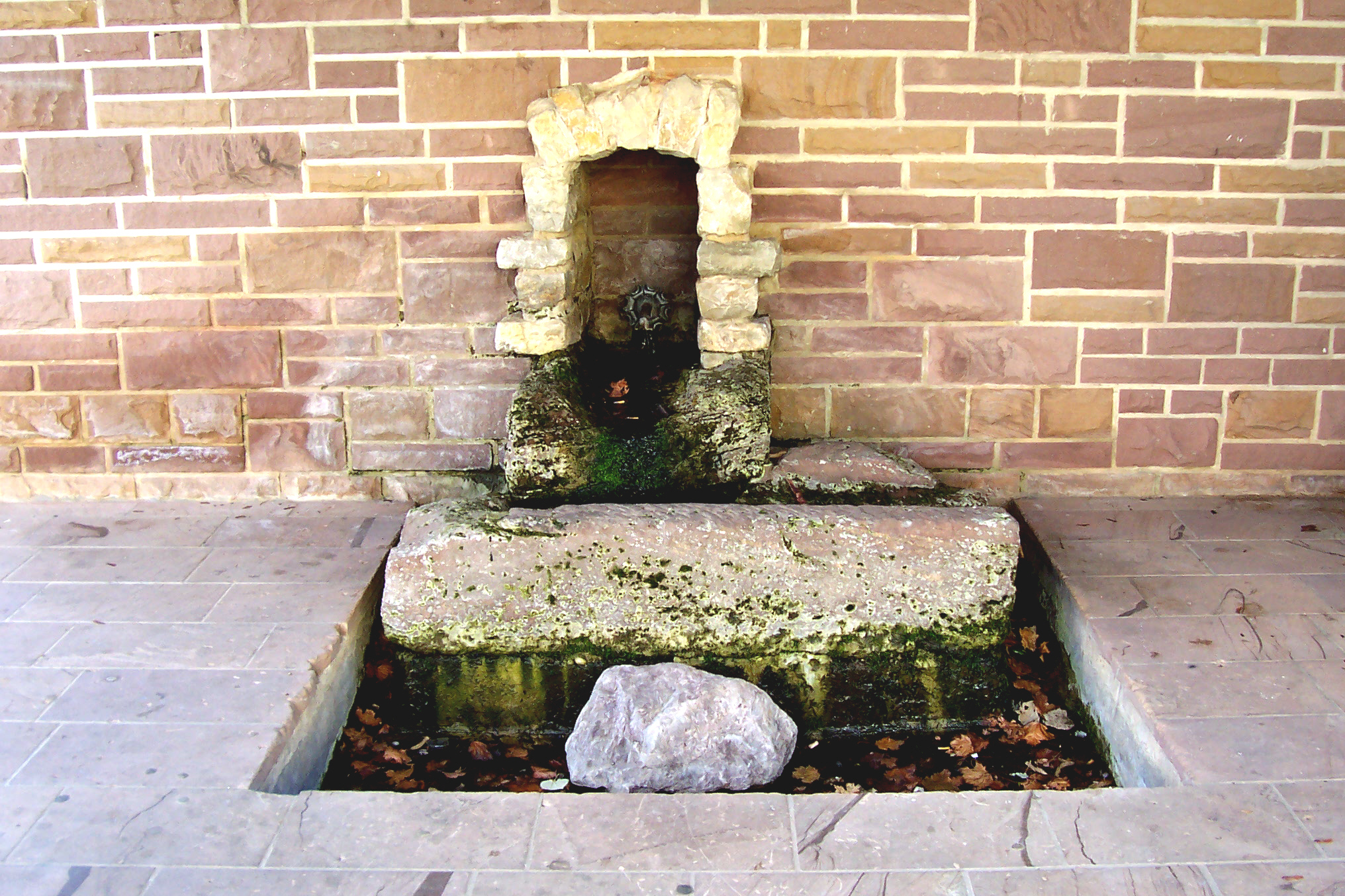 Wasserliesch, Wasserleitung der römischen Villa